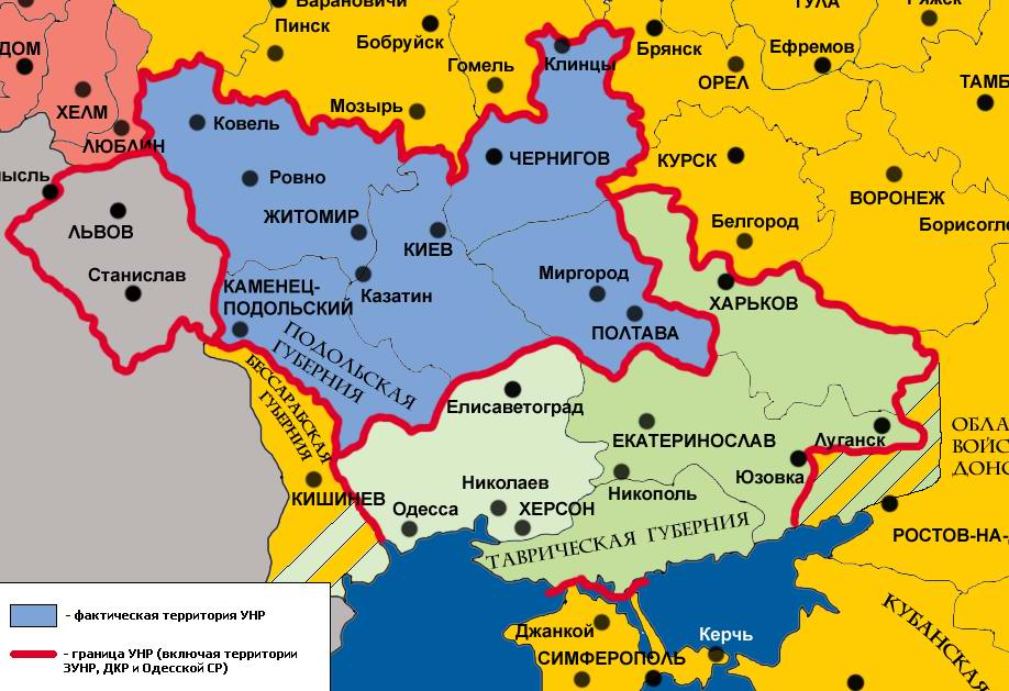 карта Украинской Народной Республики